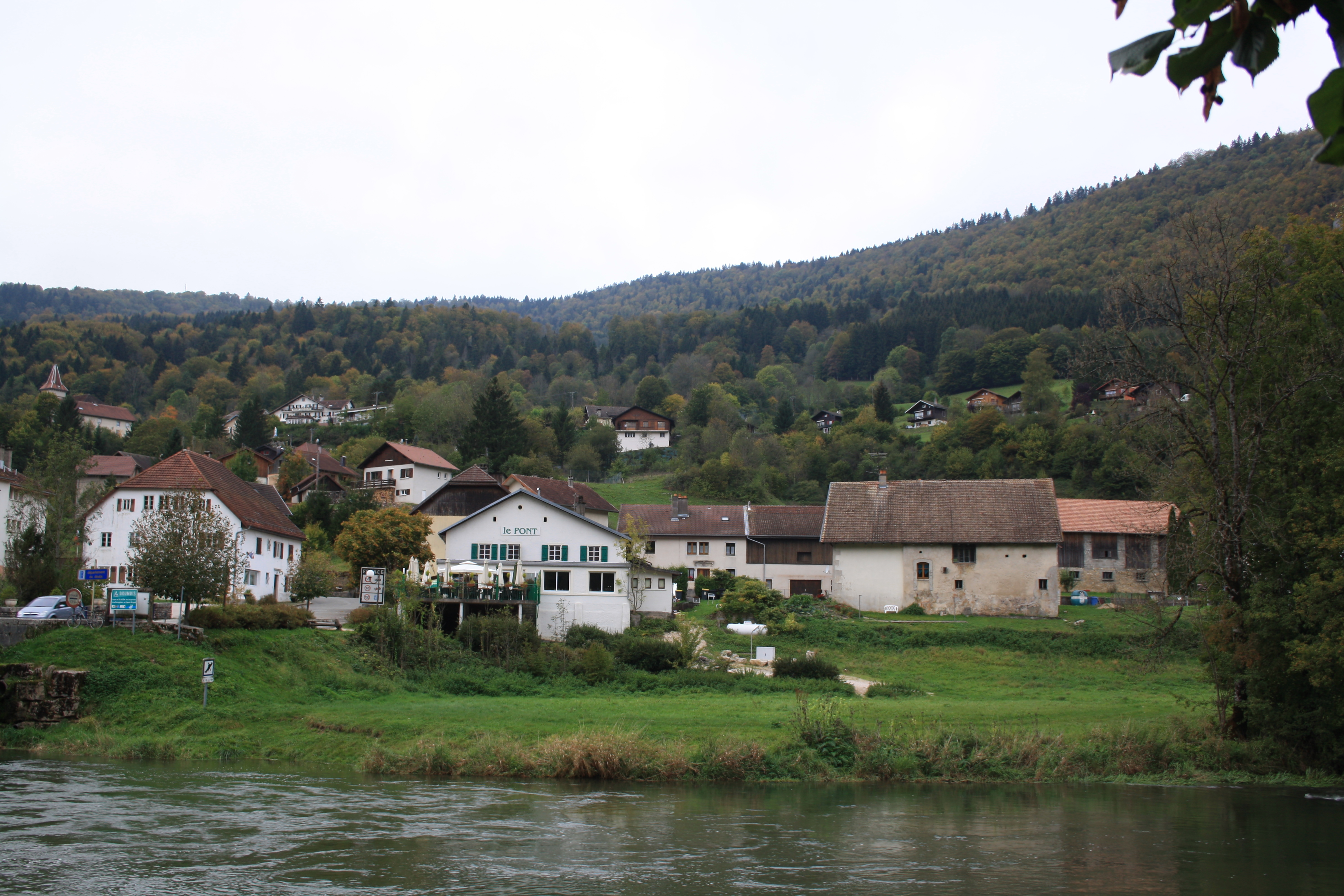 Goumois (Doubs)